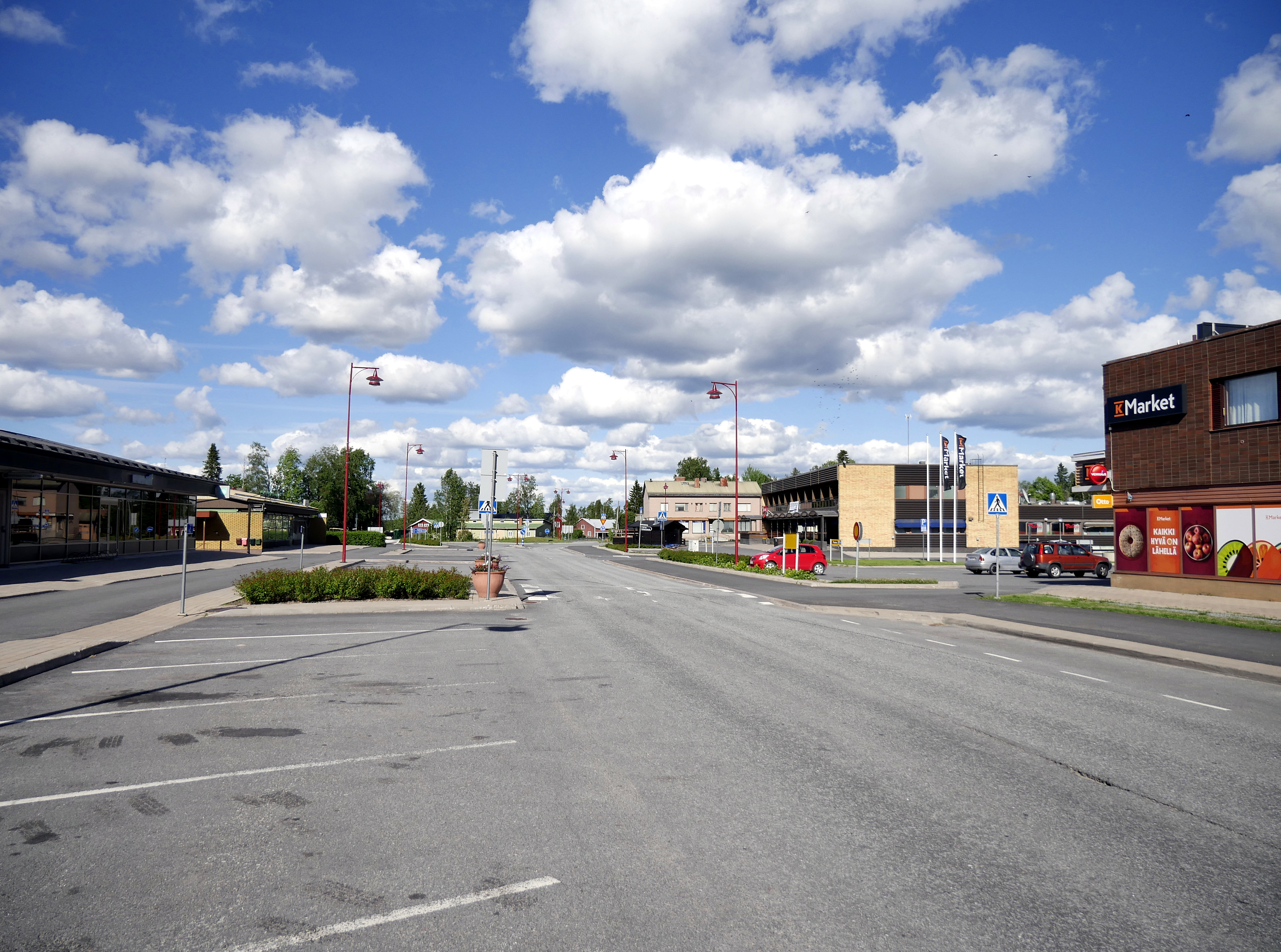 Kauppatietä Jurvassa.